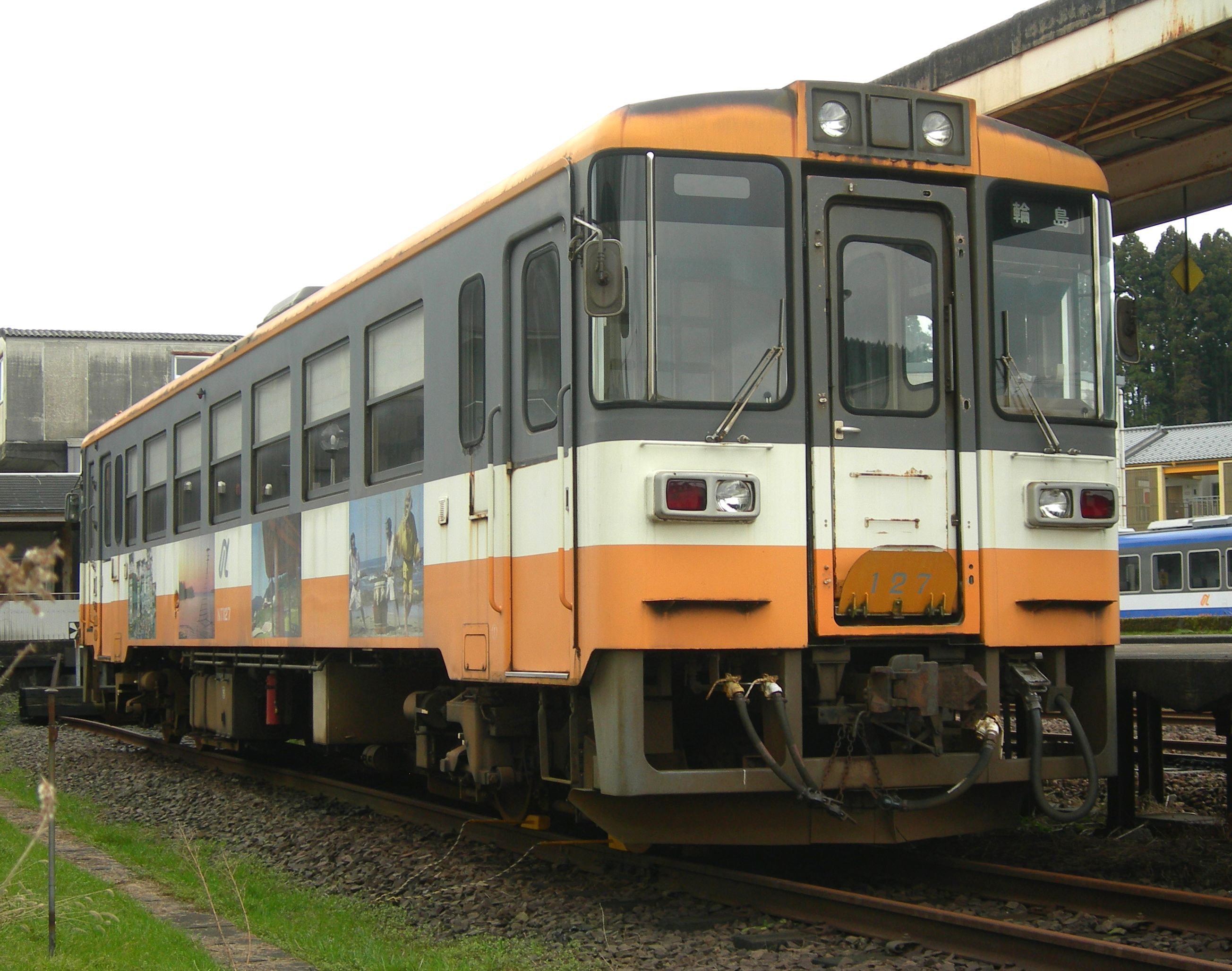 のと鉄道NT100形気動車 穴水駅で撮影